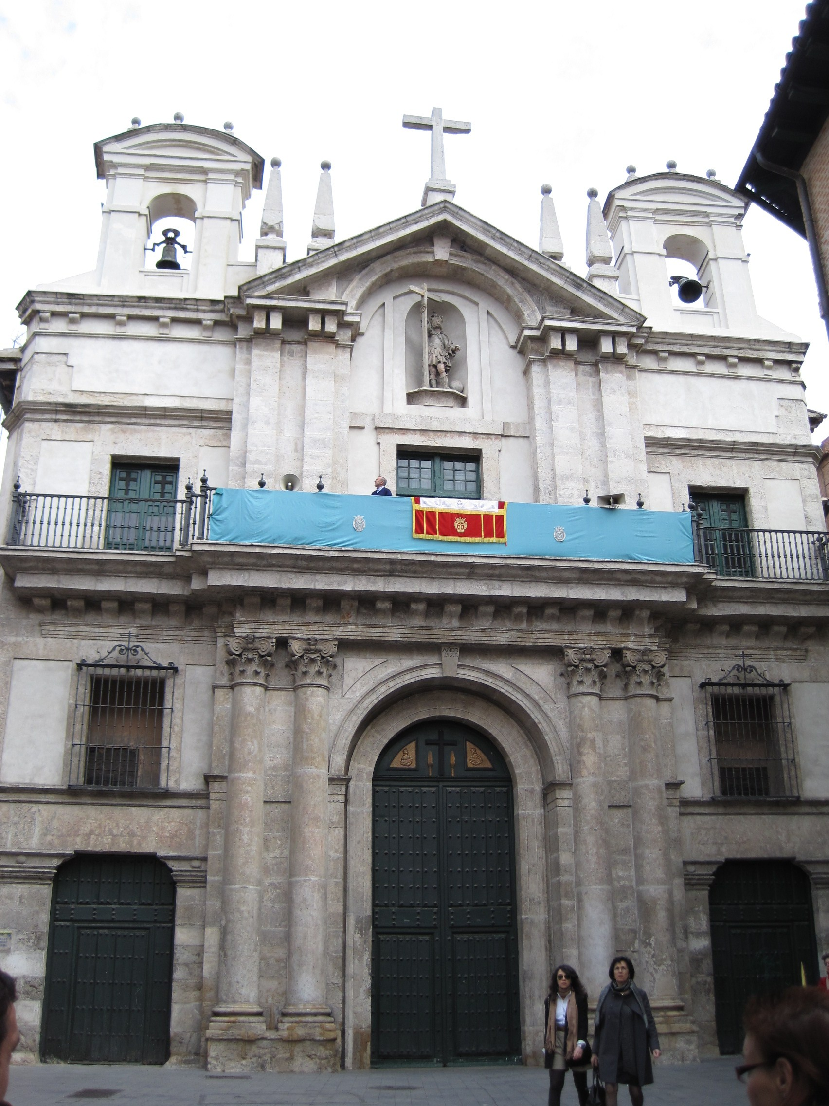 Iglesia Penitencial de Nuestra Señora de la Vera Cruz, Valladolid (España), durante la Semana Santa.